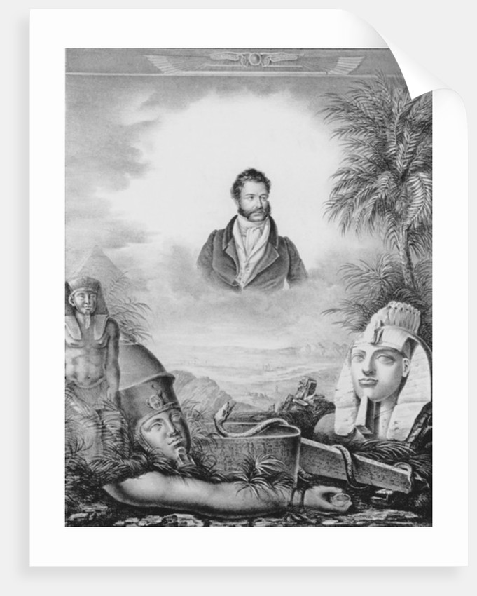 Аллегорическое изображение Джованни Баттиста Бельцони (1778 - 1823) с его находками